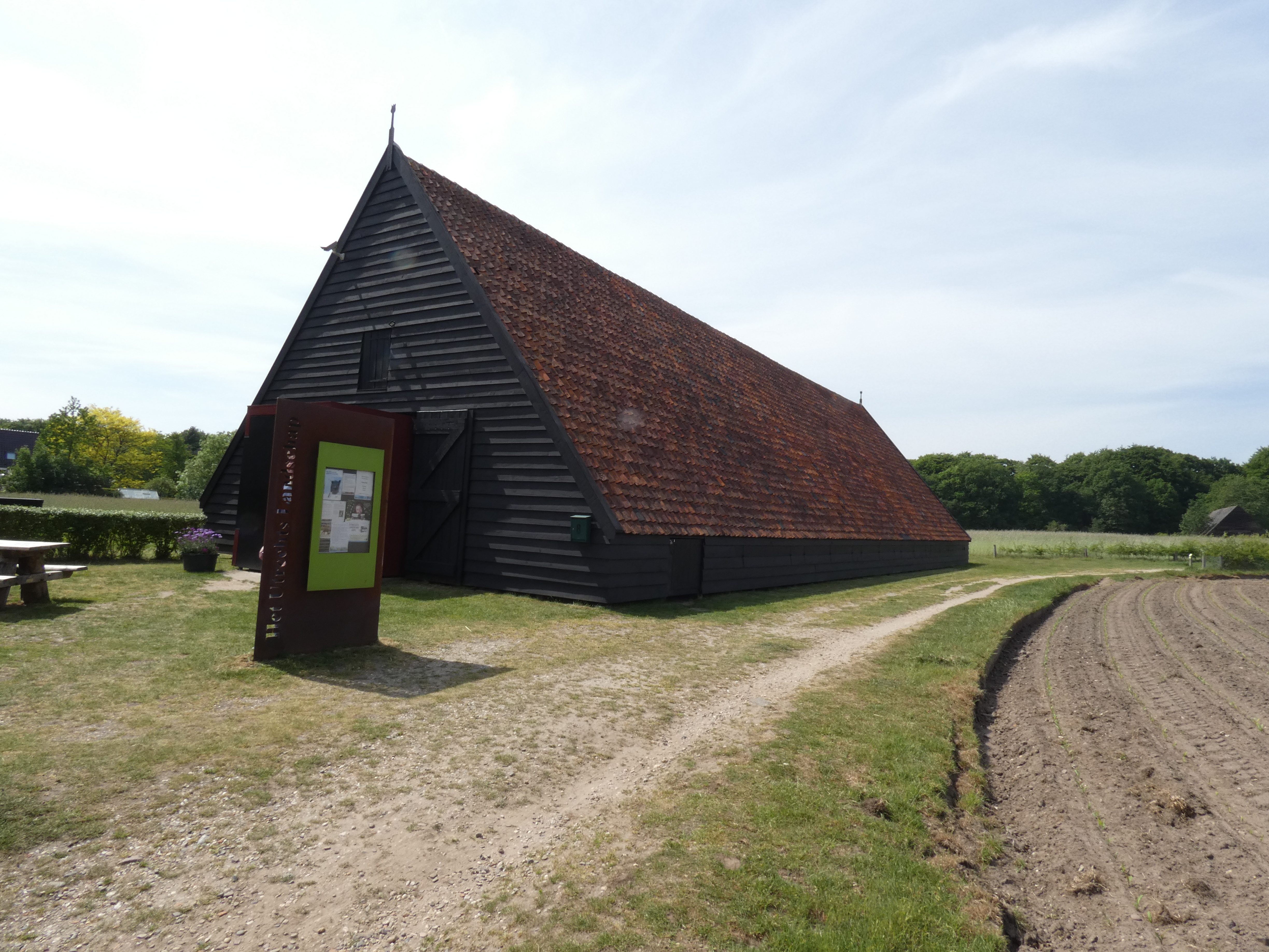 Tabaksschuur die tevens als informatiepunt dient in het Amerongse Bos.